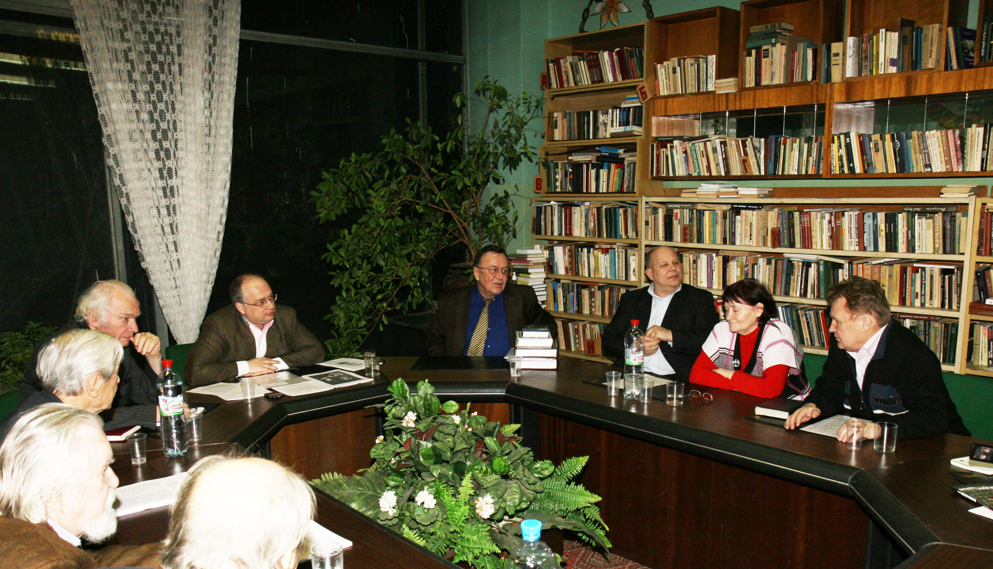 Заседание общественного совета «Библиотека дома творчества Переделкино» (крайний справа директор Степан Иванович Колмаков). 5 февраля 2011 г.